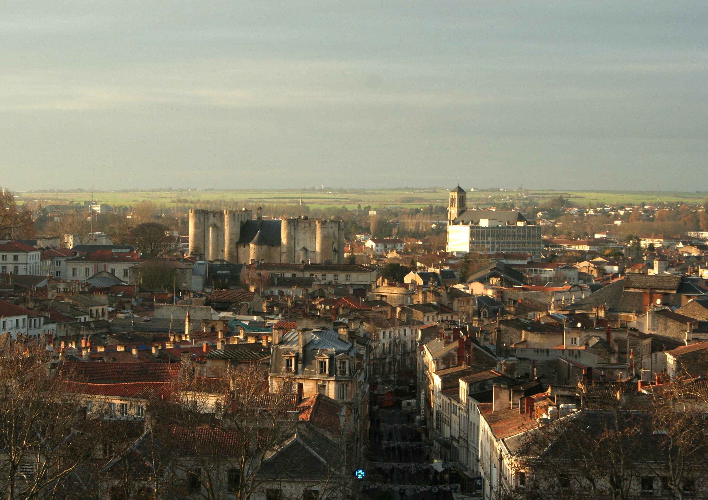 Niort centre ville (donjon, halles, église St-Étienne)